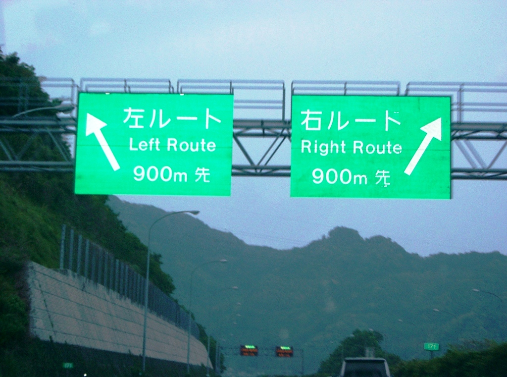 東名高速道路日本坂トンネル上り線ルート分岐標識